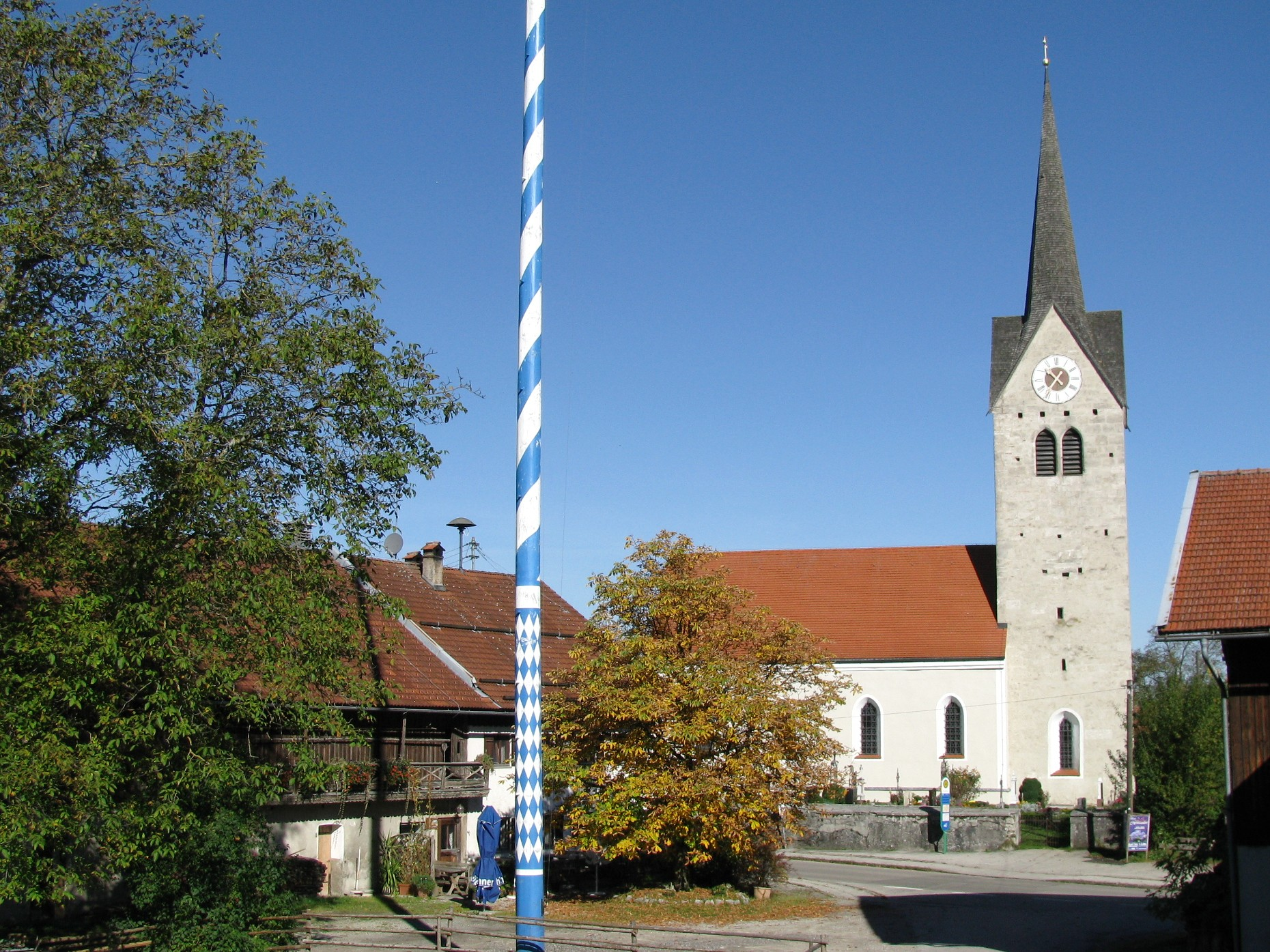 Marienkirche in Peretshofen, Ansicht von Süden